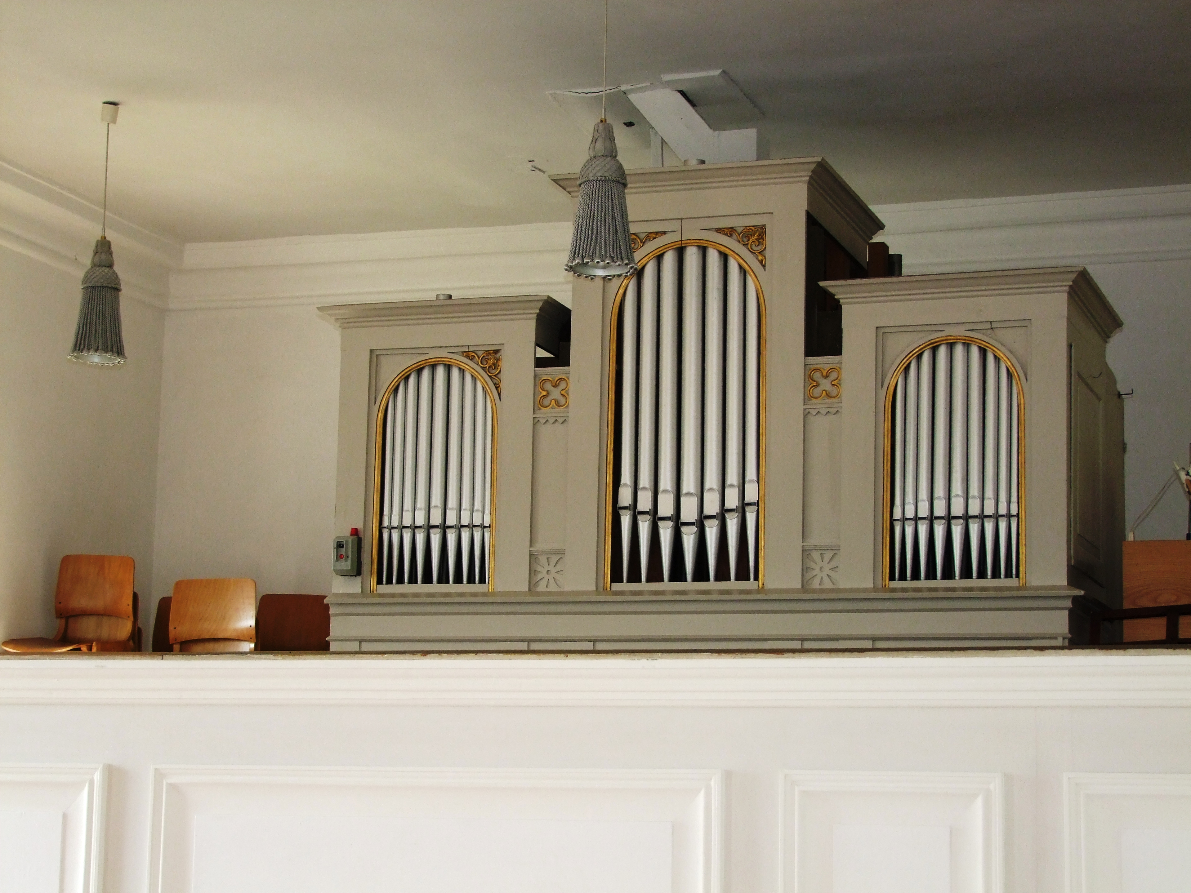 St. Peter und Paul in Bellenberg, Orgel.